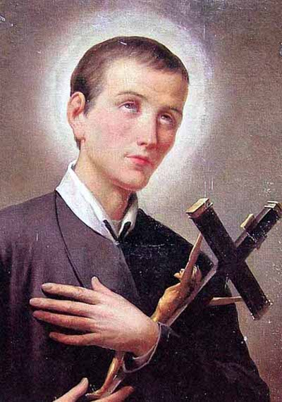 Неизвестный автор. Портрет Герардо Майелла. Предположительно конец XIX - начало XX века.